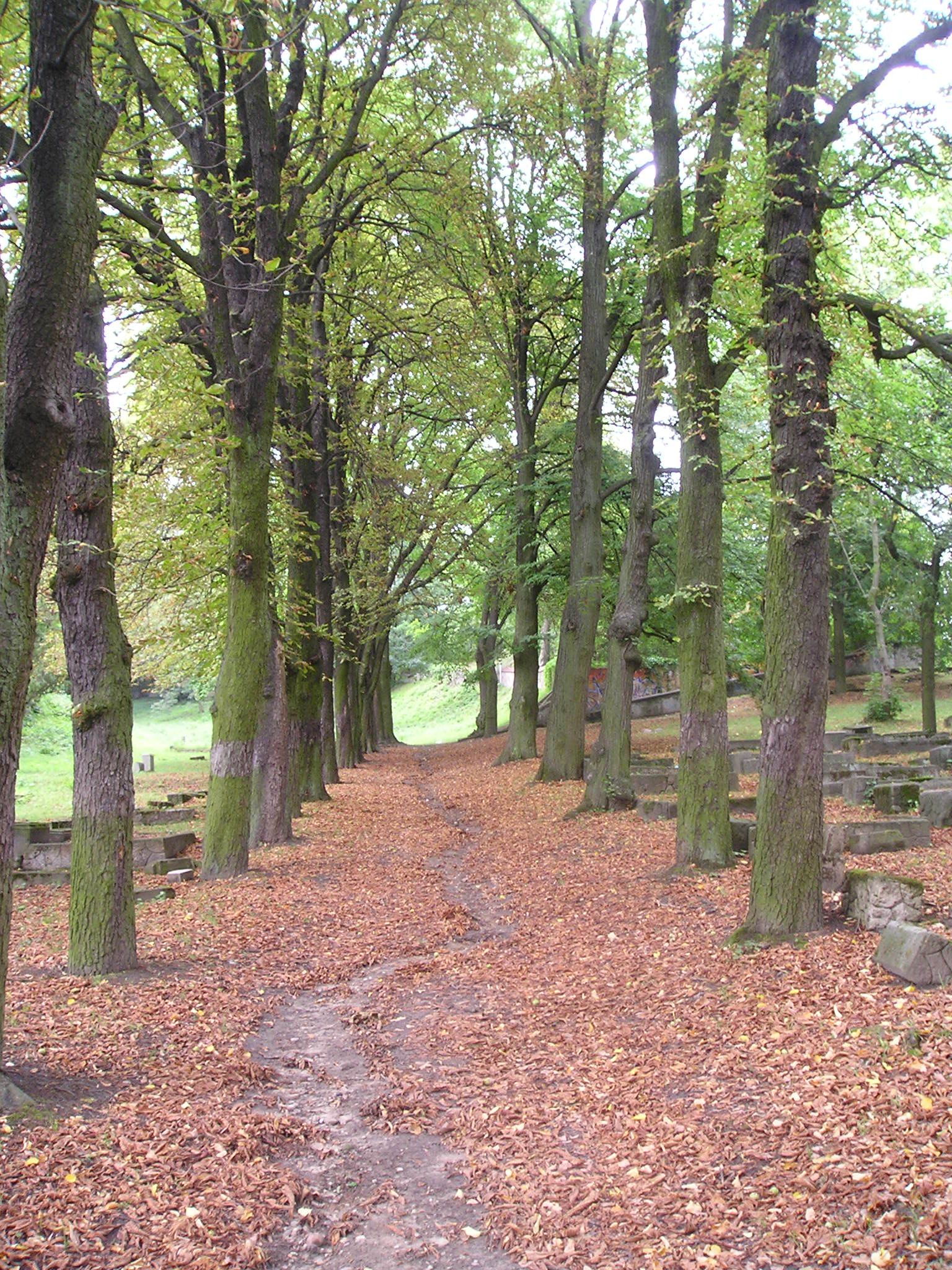 Główna alejka na kirkucie w Gorzowie